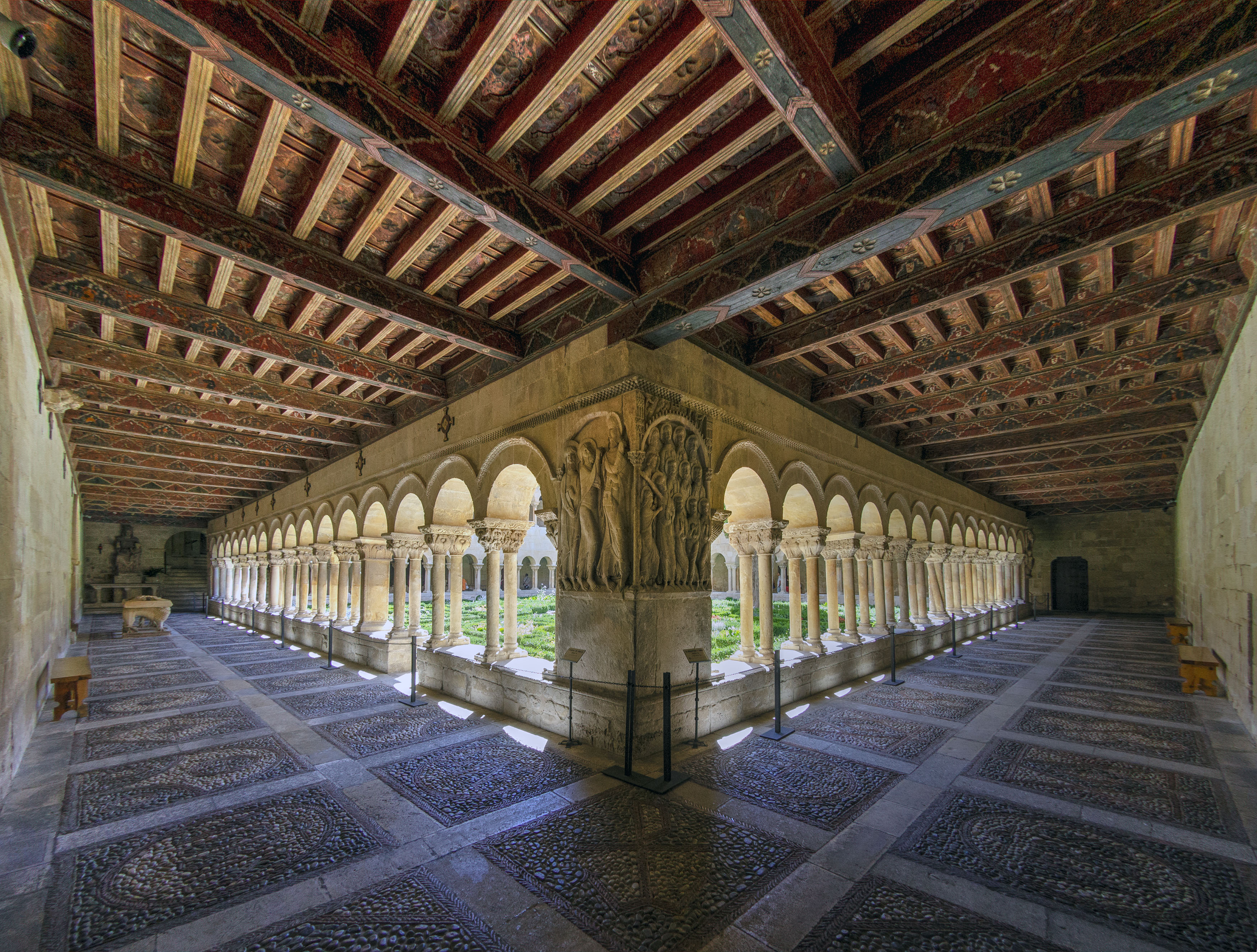 Claustro de esta abadía benedictina de la provincia de Burgos, de origen visigodo aunque la obra actual se comenzó en el siglo XI. Tras numerosas reformas, sólo el claustro mantiene una parte románica